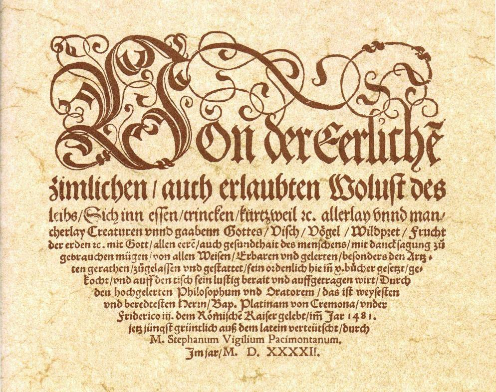 Titel der deutschen Ausgabe des Kochbuchs De honesta voluptate et valetudine von Bartolomeo Platina, verdeutscht von Stephanus Vigilius Pacimontanus, Augsburg 1542 bei Heinrich Steiner "Von der Eerlichē zimlichen / auch erlaubten Wolust des leibs / Sich inn essen / trincken / kurtzweil &c. allerlay vnnd man= cherlay Creaturen vnnd gaabenn Gottes / Visch / Vögel / Wildpret / Frucht der erden &c. mit Gott / allen eerē / auch gesundthait des menschens / mit dancksagung zũ gebrauchen mügen / von allen Weisen / Erbaren und gelerten / besonders den Artz= ten gerathen / zūgelassen und gestattet / sein ordenlich hie iñ v. bücher gesetzt / ge= kocht / vnd auff den tisch fein lustig berait vnd auffgetragen wirt / Durch den hochgelerten Philosophum vnd Oratorem / das ist weysesten vnd beredtesten Hern / Bap. Platinam von Cremona / vnder Friderico iii, dem Römischē Kaiser gelebt / iḿ Jar 1481. jetz jüngst grüntlich auß dem latein verteütscht / durch M. Stephanum Vigilium Pacimontanum, Jm jar / M. D. XXXXII."